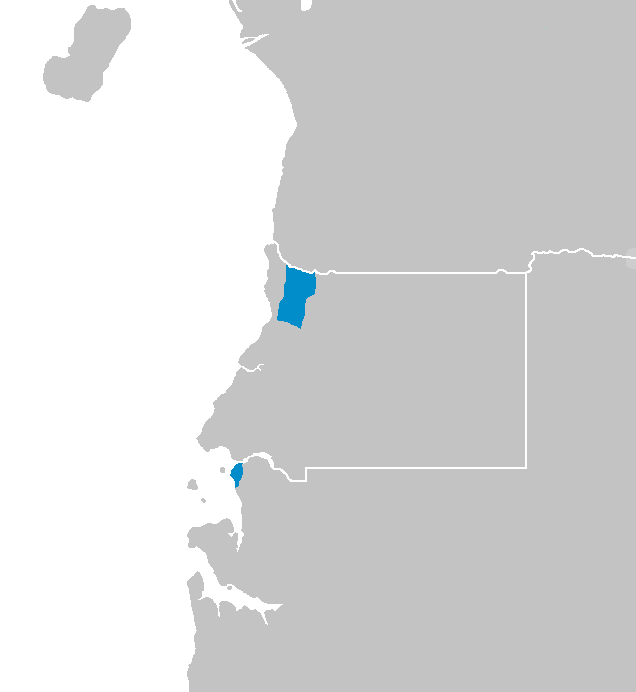 Idioma seki